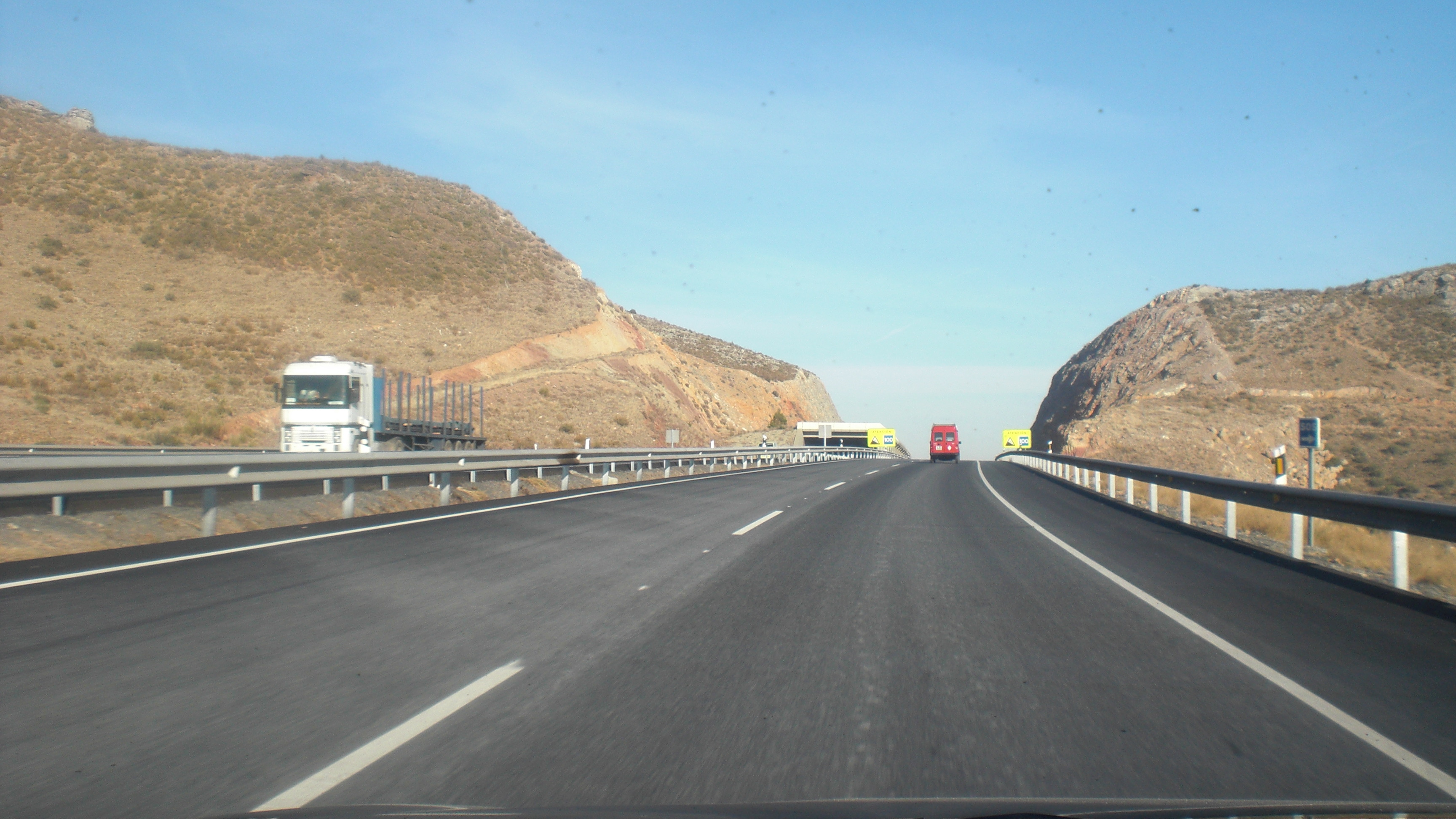 Fotografía de la autovía A-2 a supaso por el termino municipal de Chodes